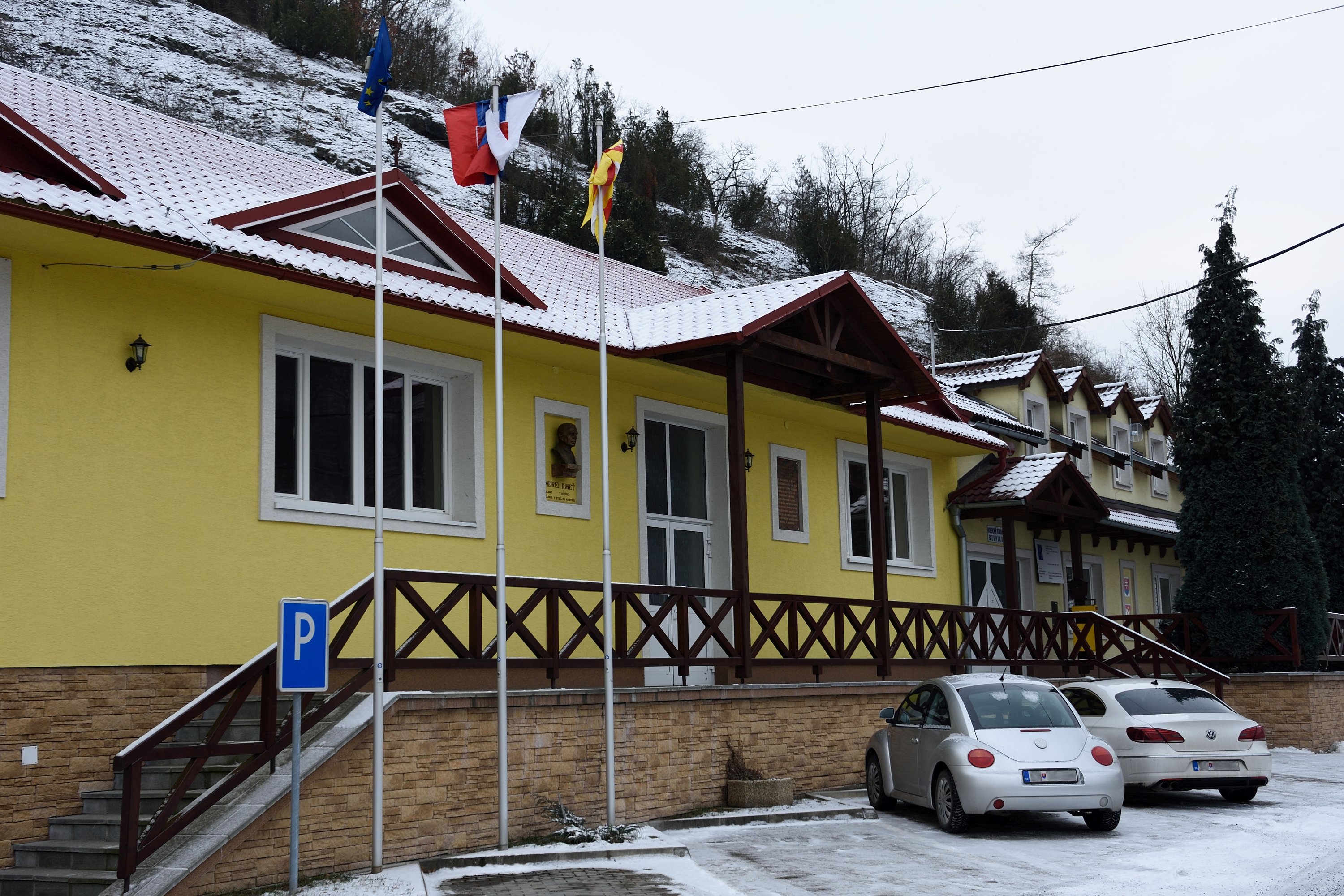 Kultúrny dom, Bzenica, okres Žiar nad Hronom.